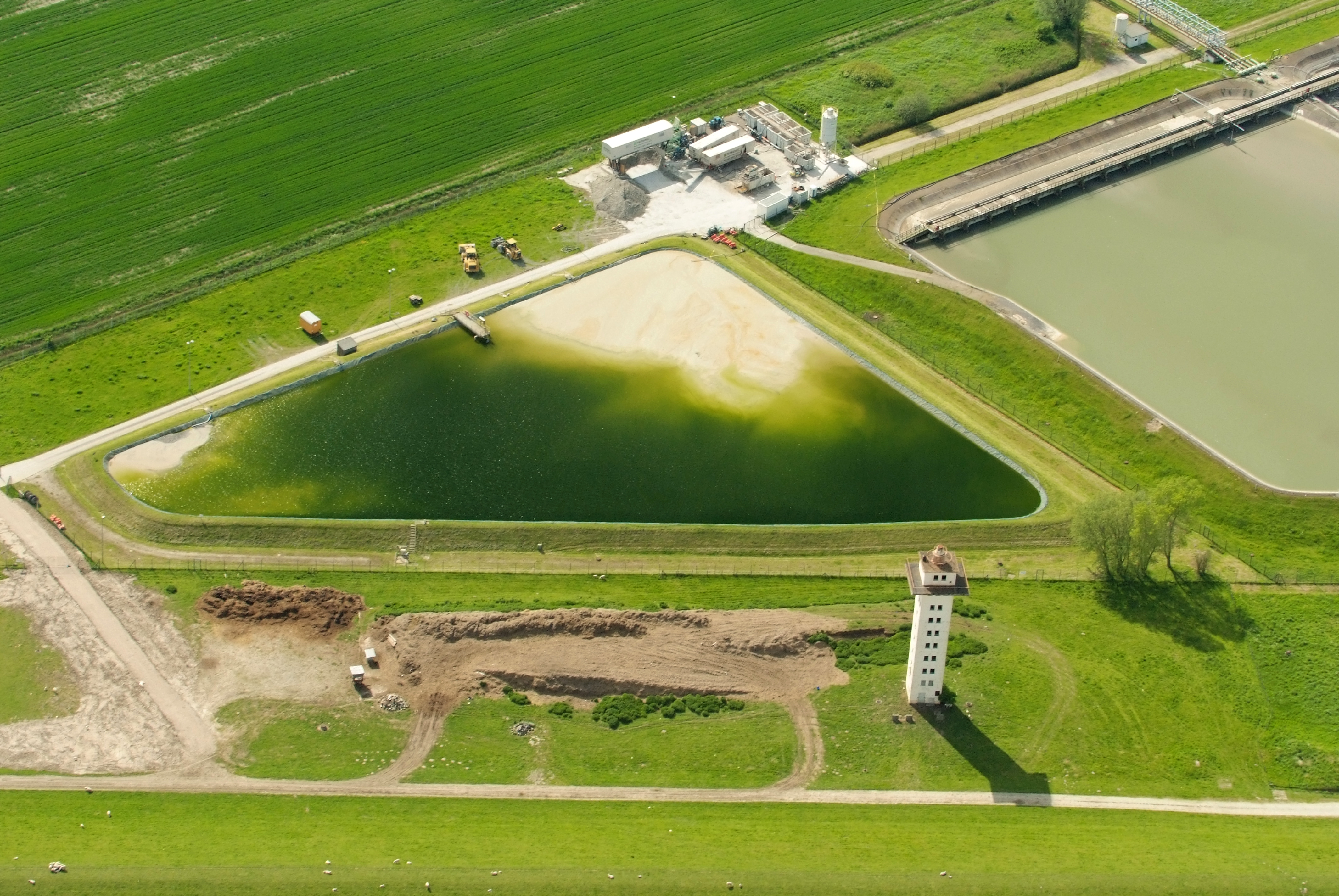 Radarstation Blexen und Absetzbecken beim Kronos-Titanwerk in Nordenham, Ortsteil Blexen Fotoflug vom Flugplatz Nordholz-Spieka über Bremerhaven, Wilhelmshaven und die Ostfriesischen Inseln bis Borkum